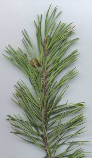 Pinus virginiana